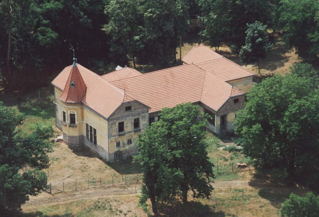 Palace - Csabaszabadi - Hungary - Europe (Beliczay Mansion)